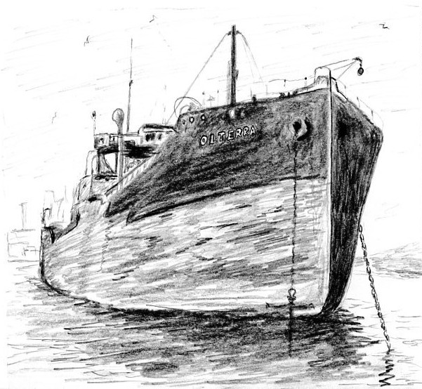 Итальянский пароход "Ольтерра". Использовался диверсантами 10-й флотилии МАС как база для операций в Гибралтаре во время Второй мировой войны. рисунок.